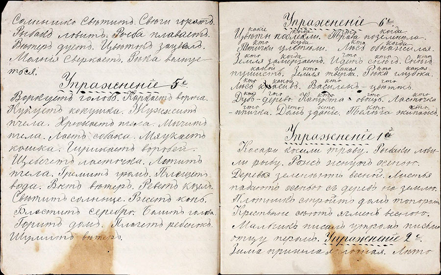 Тетрадь по русскому языку ученика 1 класса Кривощекова И.Я. Фрагмент. КПОГА,Ф.138,Оп.1,Д.4,Л.2об.,3